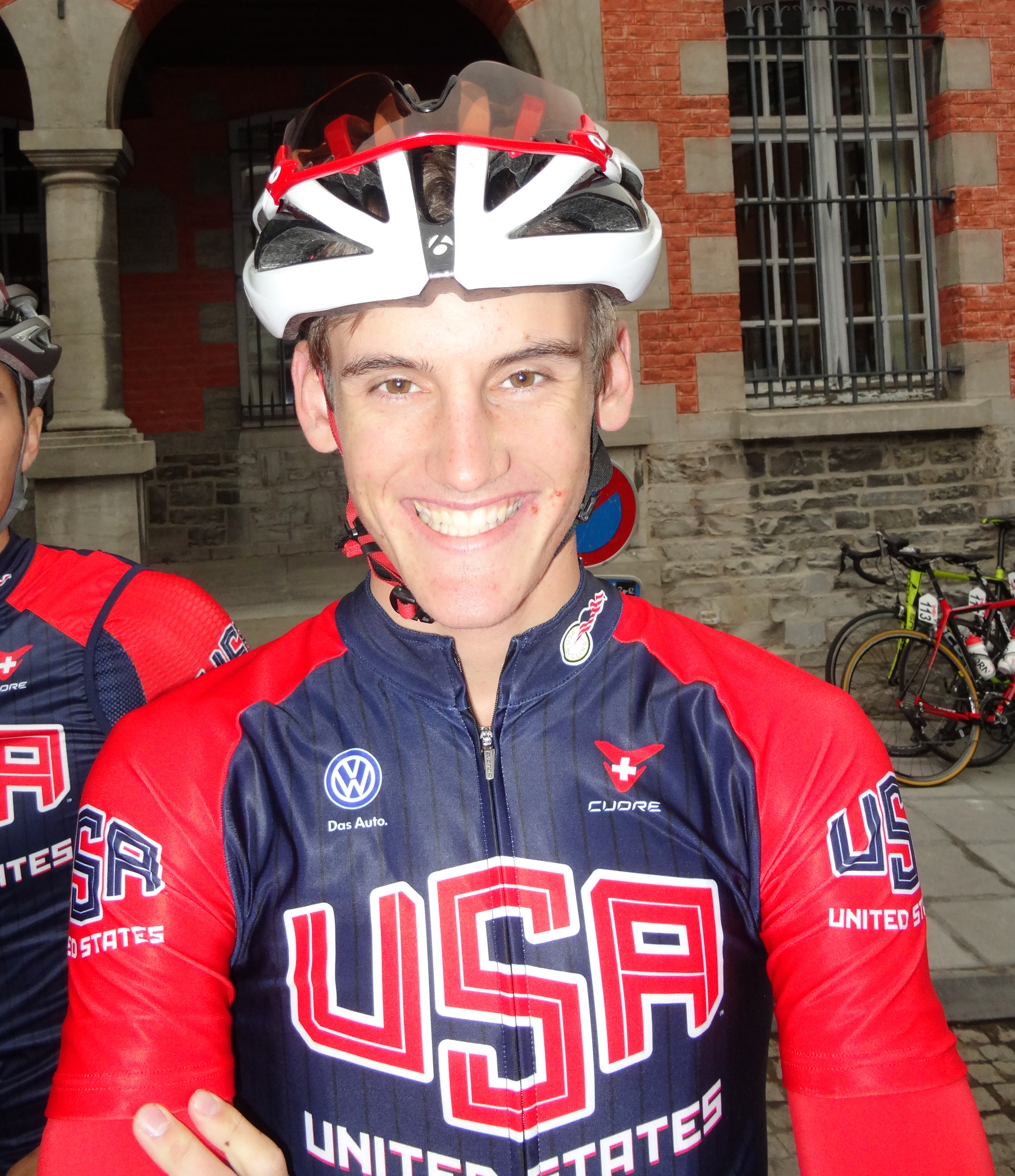 Triptyque des Monts et Châteaux 2014, étape 1, 4 avril 2014, départ d'Antoing. Depicted person: Geoffrey Curran Depicted team: Équipe nationale des États-Unis espoirs no fallback page found for autotranslate (base=By courtesy of Triptyque des Monts et Châteaux 2014, lang=en)